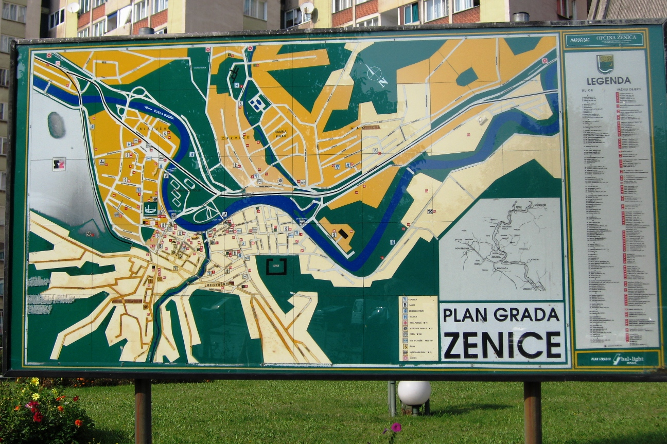 Plan grada.